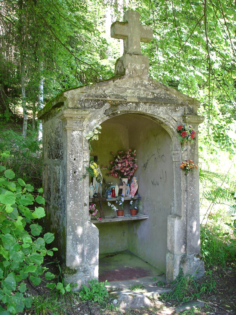 oratoire en moellons de grès - lieu-dit le « Bon Dieu » - en rive gauche du ruisseau le Charmois - commune de Neufmaisons 54396 France.